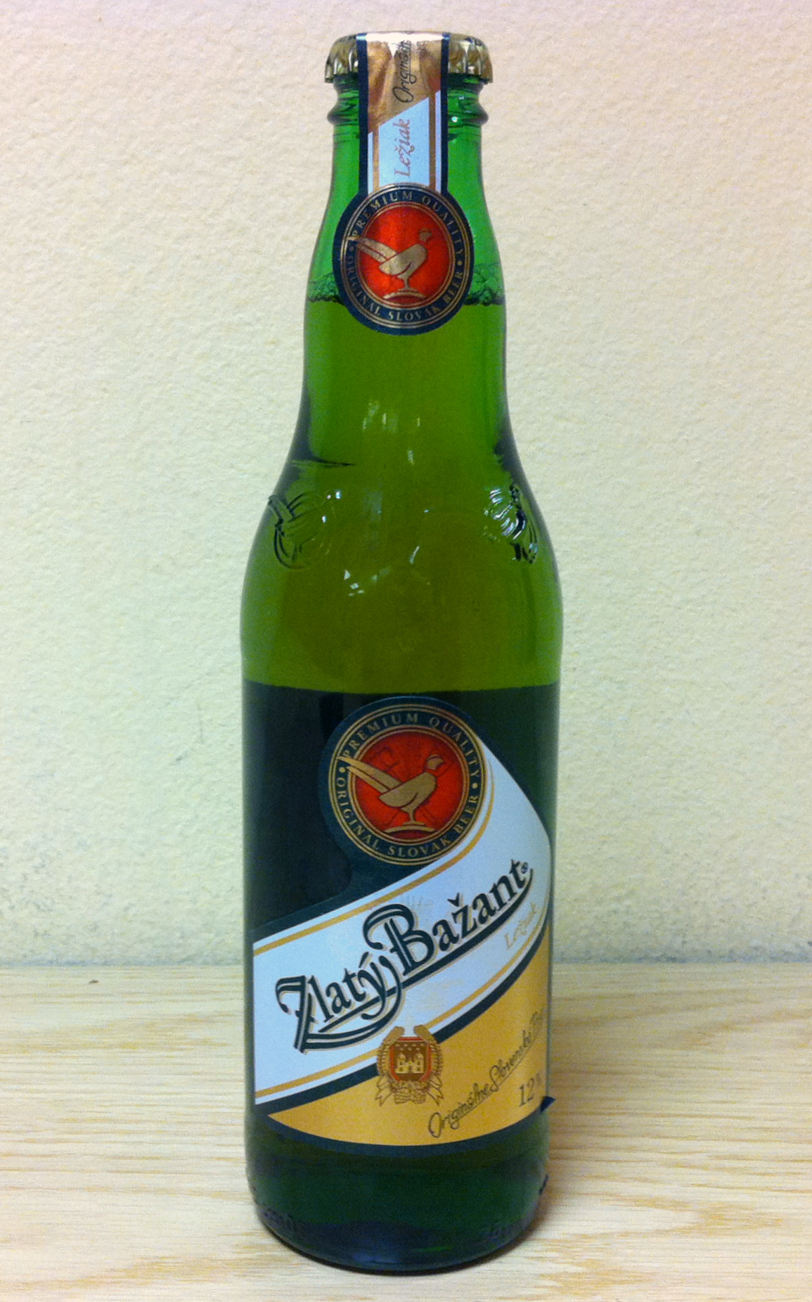 Tretinková fľaška piva Zlatý Bažant